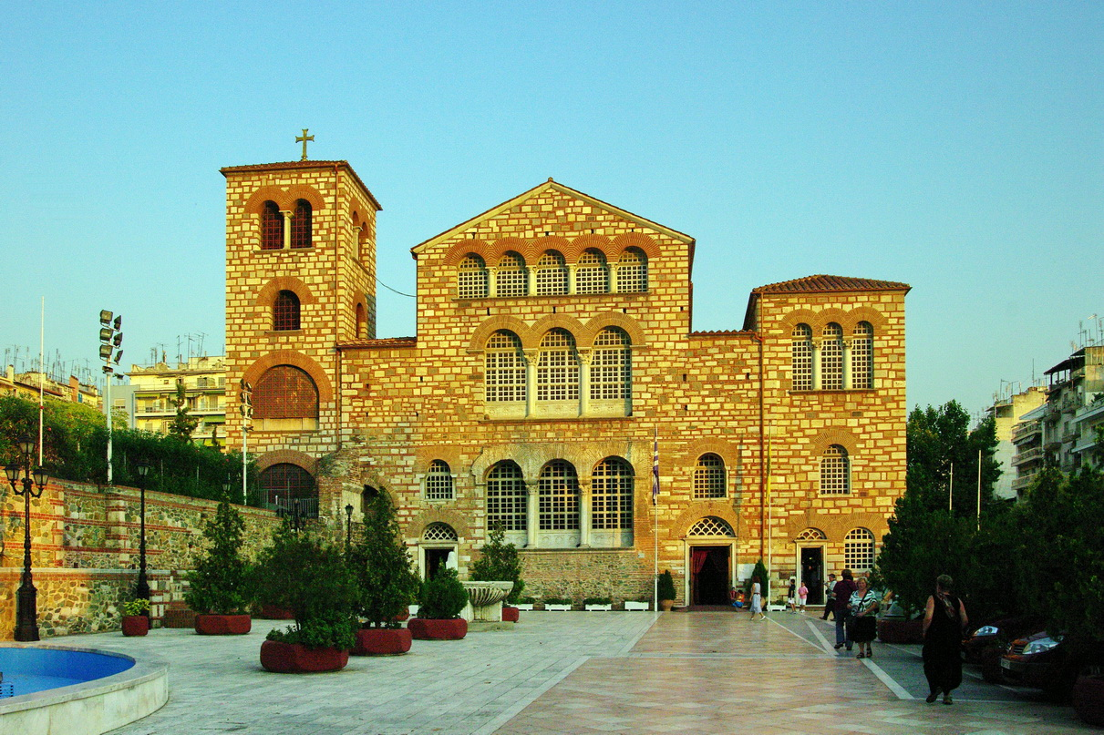 Agios Dimitrios, Thessaloniki